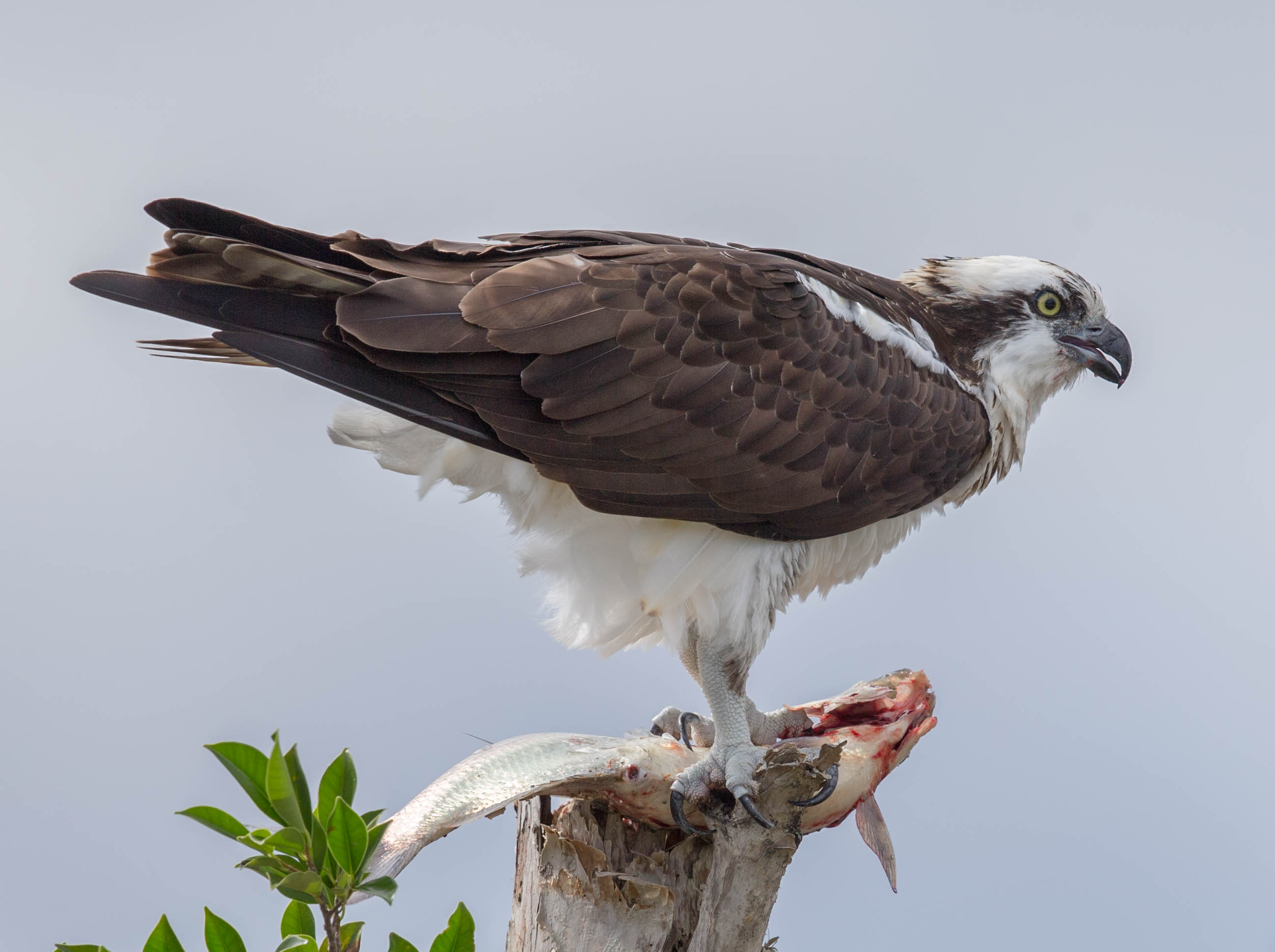 20160207-_74P5693.jpg